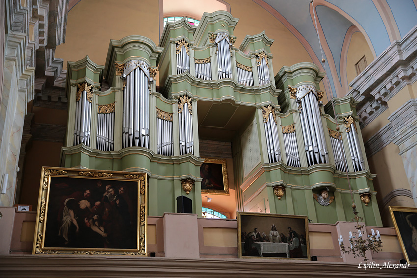 Пінск. Францысканскі касцёл. Арган